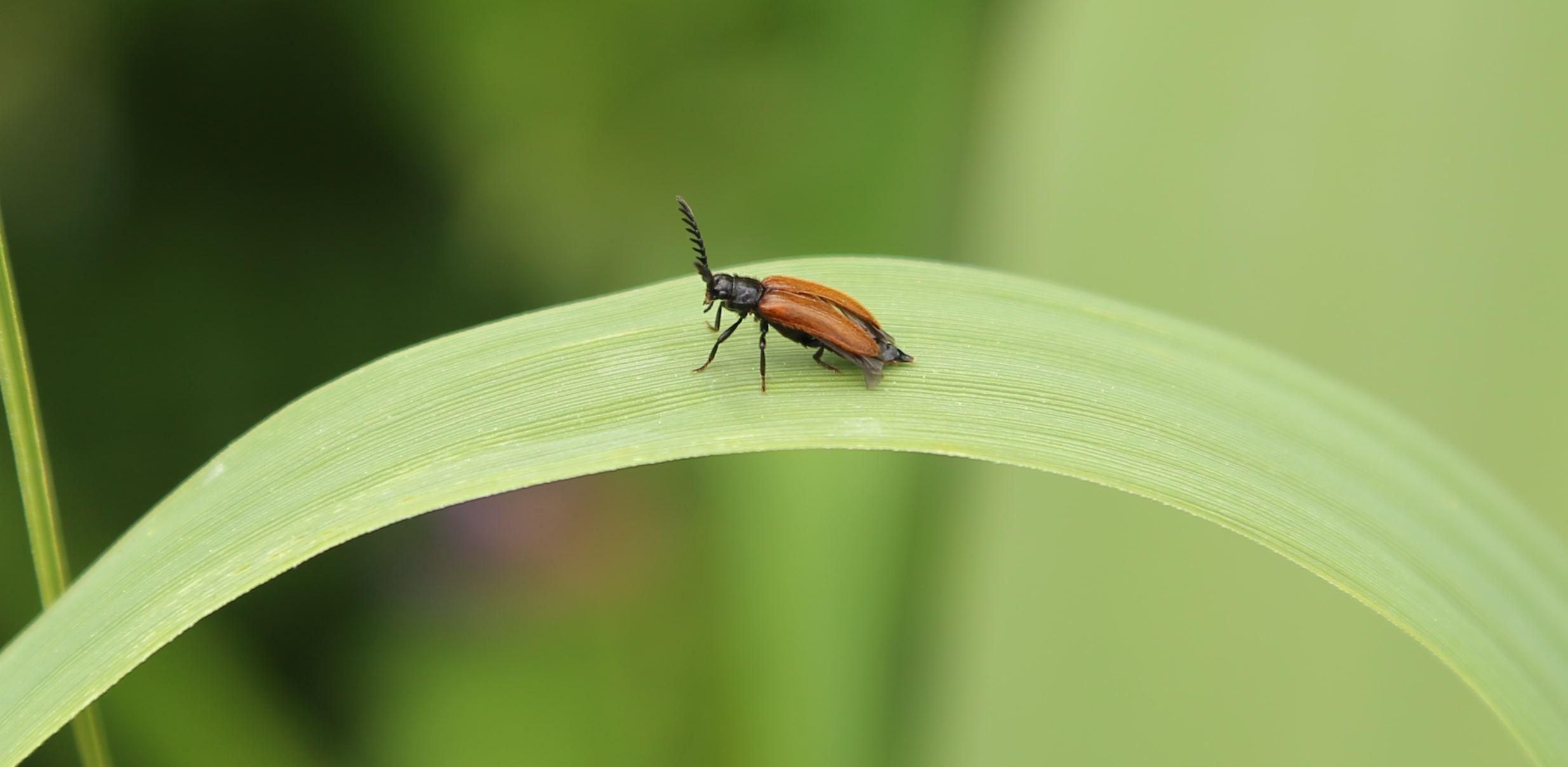 Drilus flavescens Olivier, 1790 ♂ - Drilidae su foglia di Arundo donax